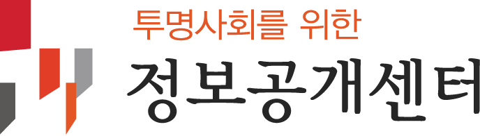 투명사회를 위한 정보공개센터의 로고입니다.